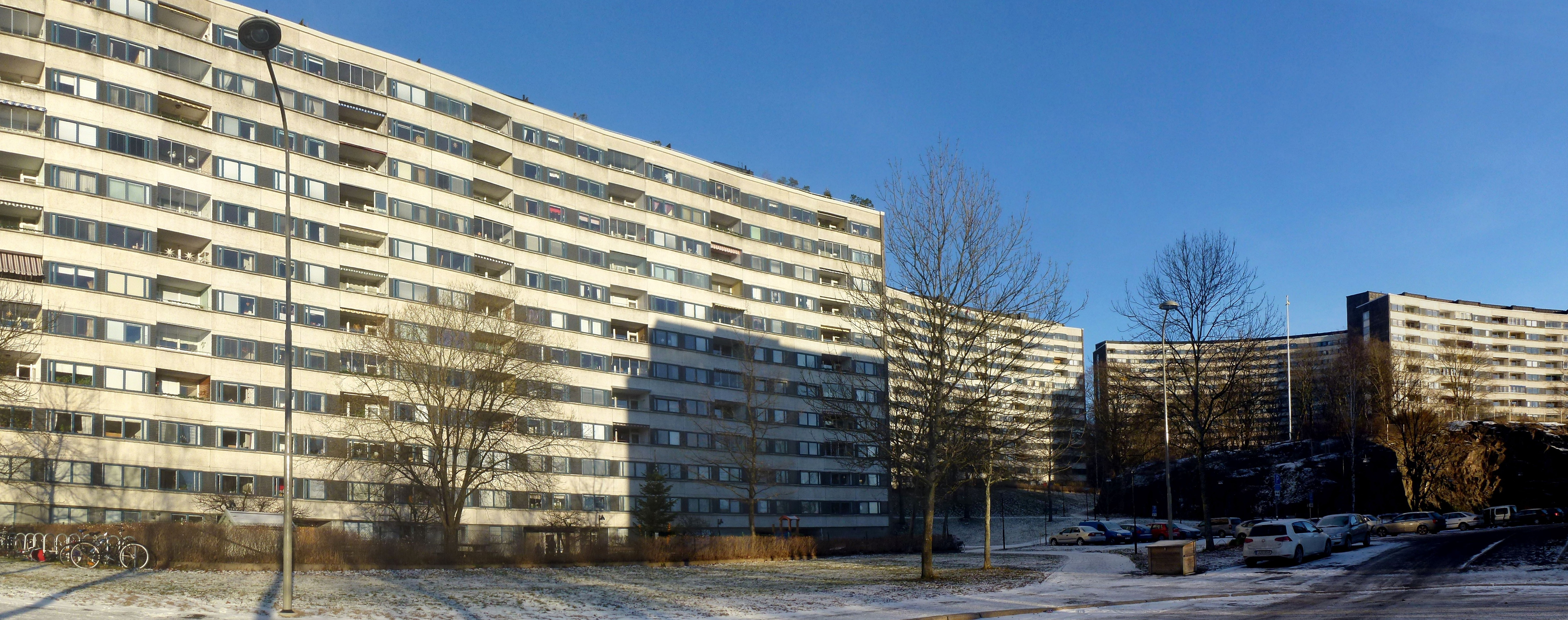 Tantoområdet i Stockholm